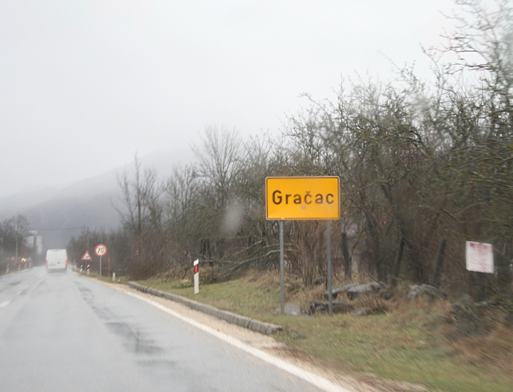 Zagreb_Split